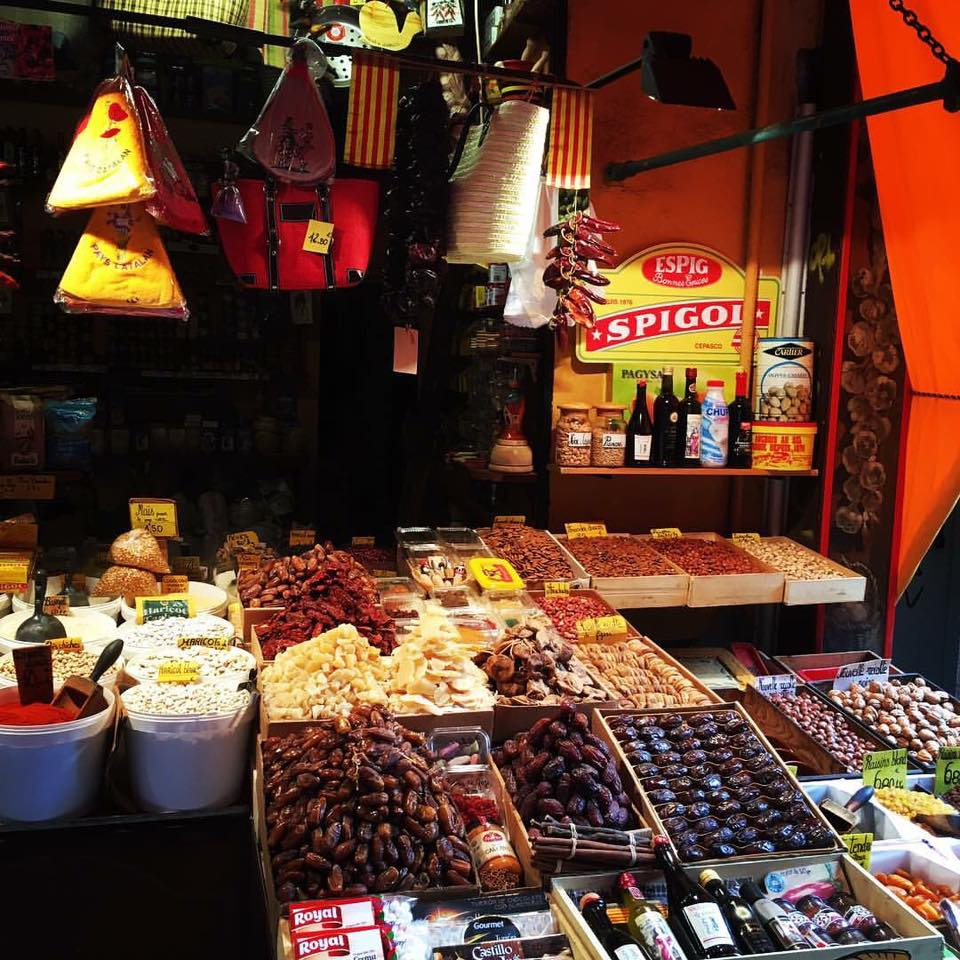 Épices rue Paratilla à Perpignan